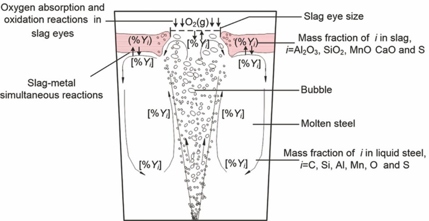 ااکسیژن زدایی